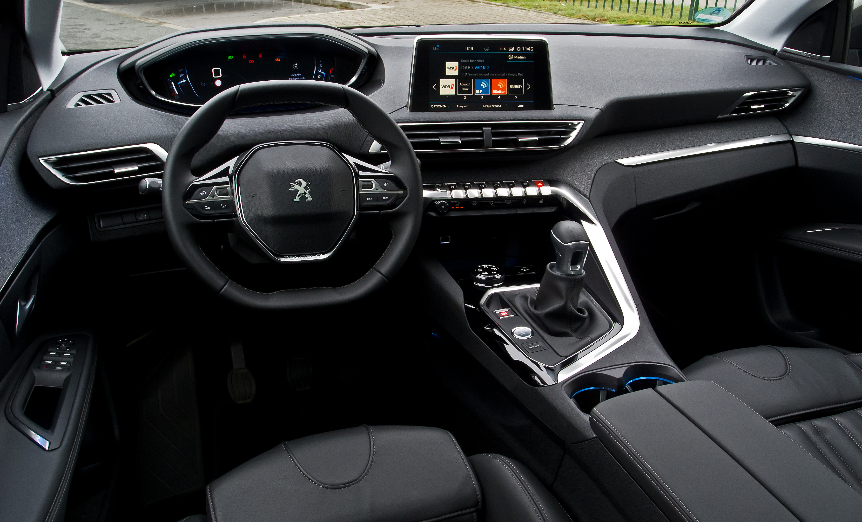 Peugeot 3008 BlueHDi 150 Allure (II)